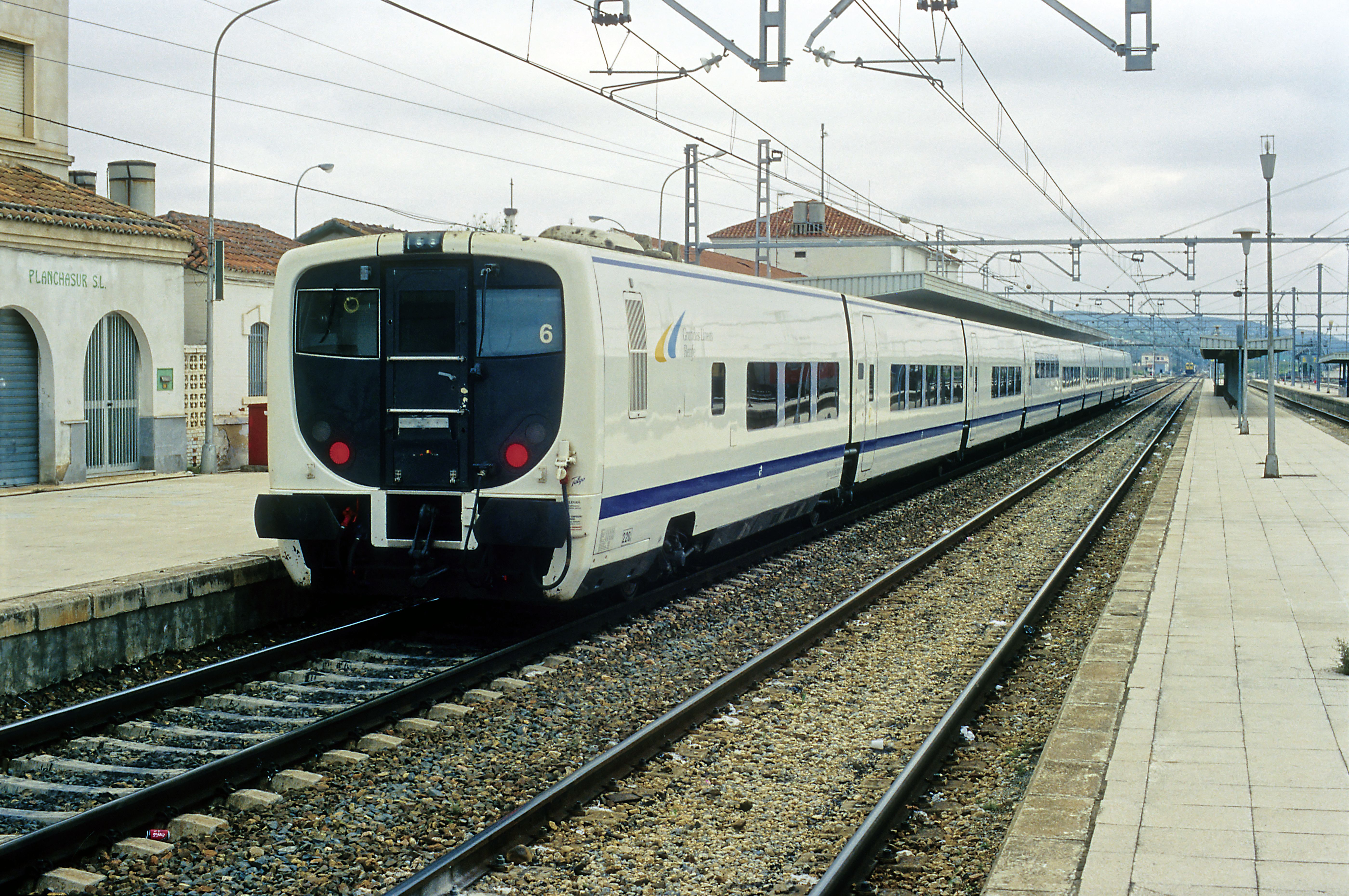 Talgo 7, beide Endwagen sind wagenbaulich identisch. Der Führerstand liegt in Fahrtrichtung rechts, die Energieversorgung erfolgt über die Zugsammelschiene. See also: Talgo.